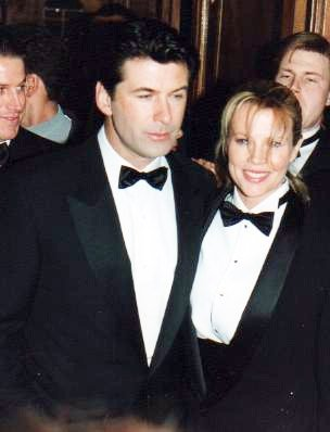 Alec Baldwin et Kim Basinger à la cérémonie des Césars